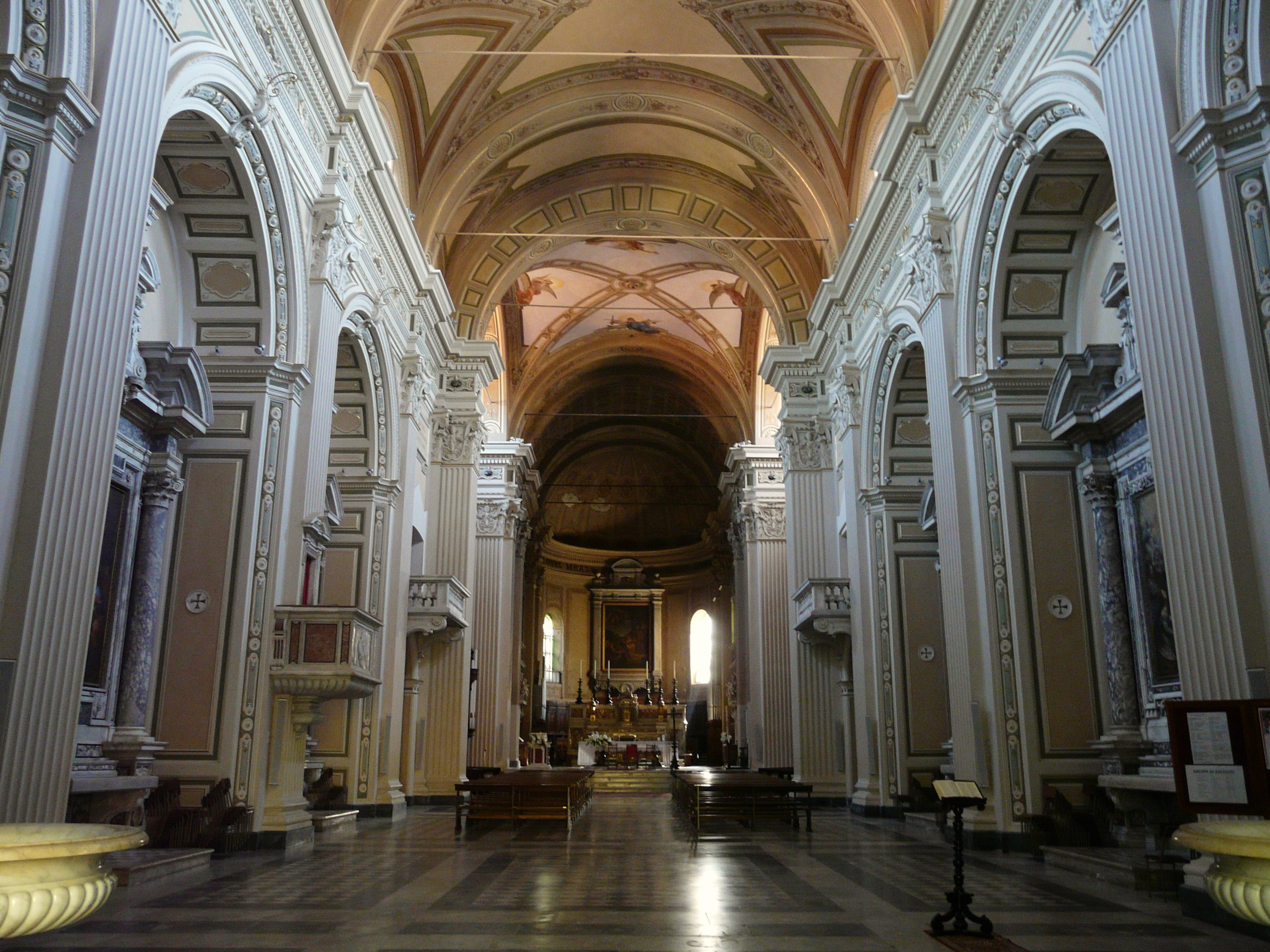 Navata centrale del duomo di Massa, Toscana, Italia